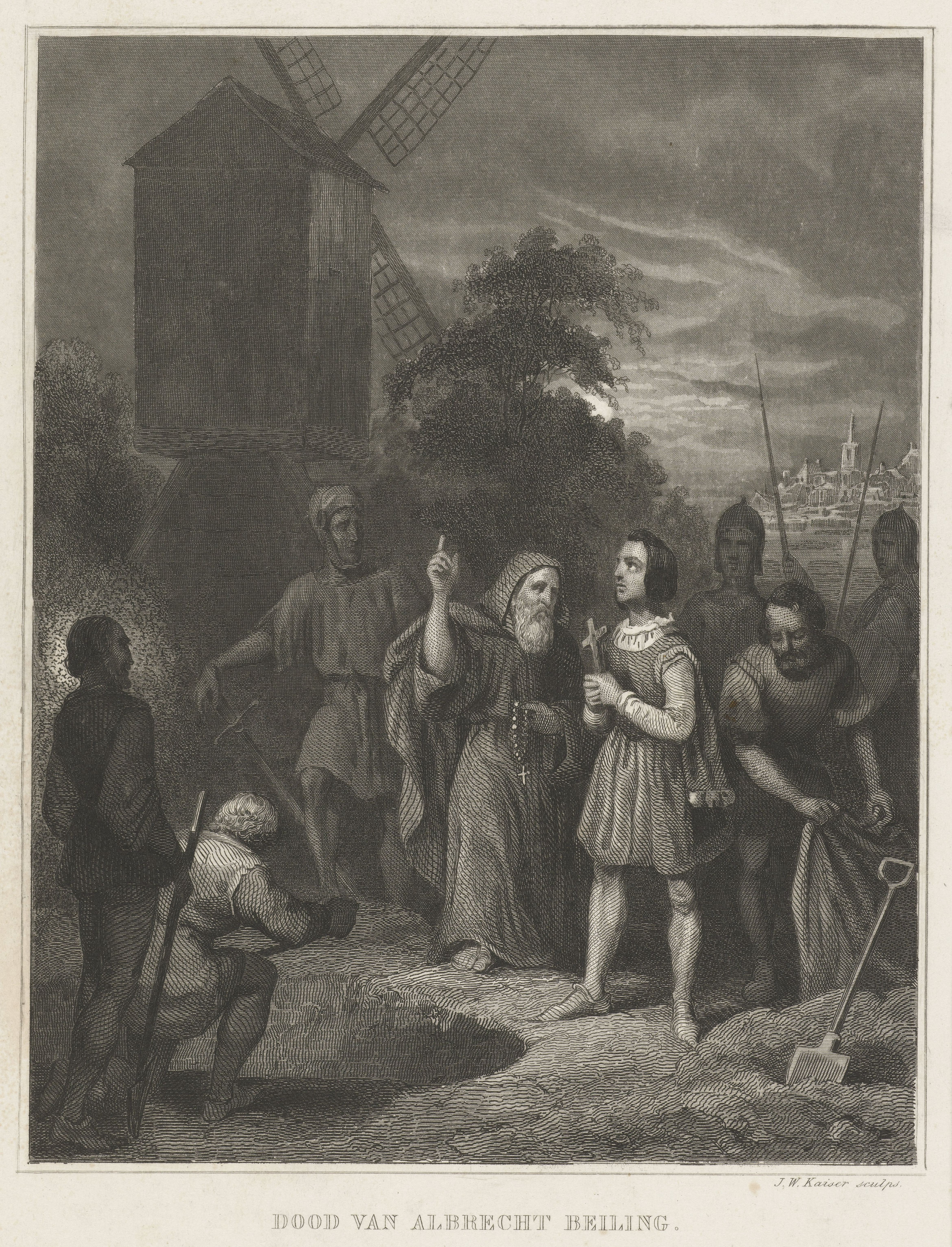 IdentificatieTitel(s): Dood van Albrecht Beiling, 1426Dood van Albrecht Beiling (titel op object)Objecttype: prent historieprent Objectnummer: RP-P-OB-78.301Catalogusreferentie: FMH 276Atlas van Stolk 19Atlas van Stolk 177Omschrijving: Albrecht Beiling, bevelhebber in Schoonhoven, door Jacoba van Beieren veroordeeld om levend begraven te worden, maakt zich klaar om te sterven, januari 1426.VervaardigingVervaardiger: prentmaker: Johann Wilhelm Kaiser (I) (vermeld op object)Plaats vervaardiging: NederlandDatering: 1842 - 1844Fysieke kenmerken: staalgravureMateriaal: papier Techniek: staalgravureAfmetingen: papier: h 235 mm × b 185 mmToelichtingIllustratie voor: J.P. Arend, Algemeene geschiedenis des vaderlands, Amsterdam, 5 delen, 1840-1882, dl. 2.2, p. 496.OnderwerpWat: on the scaffold or place of executionHoekse en Kabeljauwse twistenWanneer: 1426-01 - 1426-01Waar: SchoonhovenNederlandWie: Jacoba van Beieren (gravin van Holland, Zeeland en Henegouwen)Albrecht BeilingVerwerving en rechtenVerwerving: aankoop 1881Copyright: Publiek domein